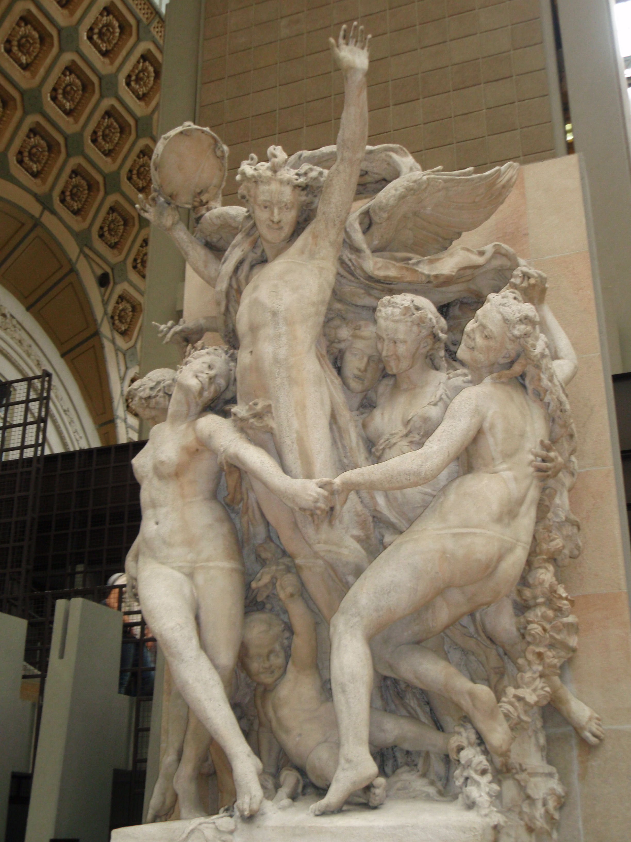 Jean-Baptiste Carpeaux, La Danse, Paris, musée d'Orsay, France. Sculpture réalisée entre 1865 et 1869. Ce groupe qui ornait la façade de l'Opéra de Paris a été remplacé dans les années 1960 par une copie à l'identique exécutée par Paul Belmondo.